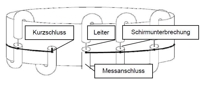 Prinzipieller Aufbau einer Rogovski-Spule